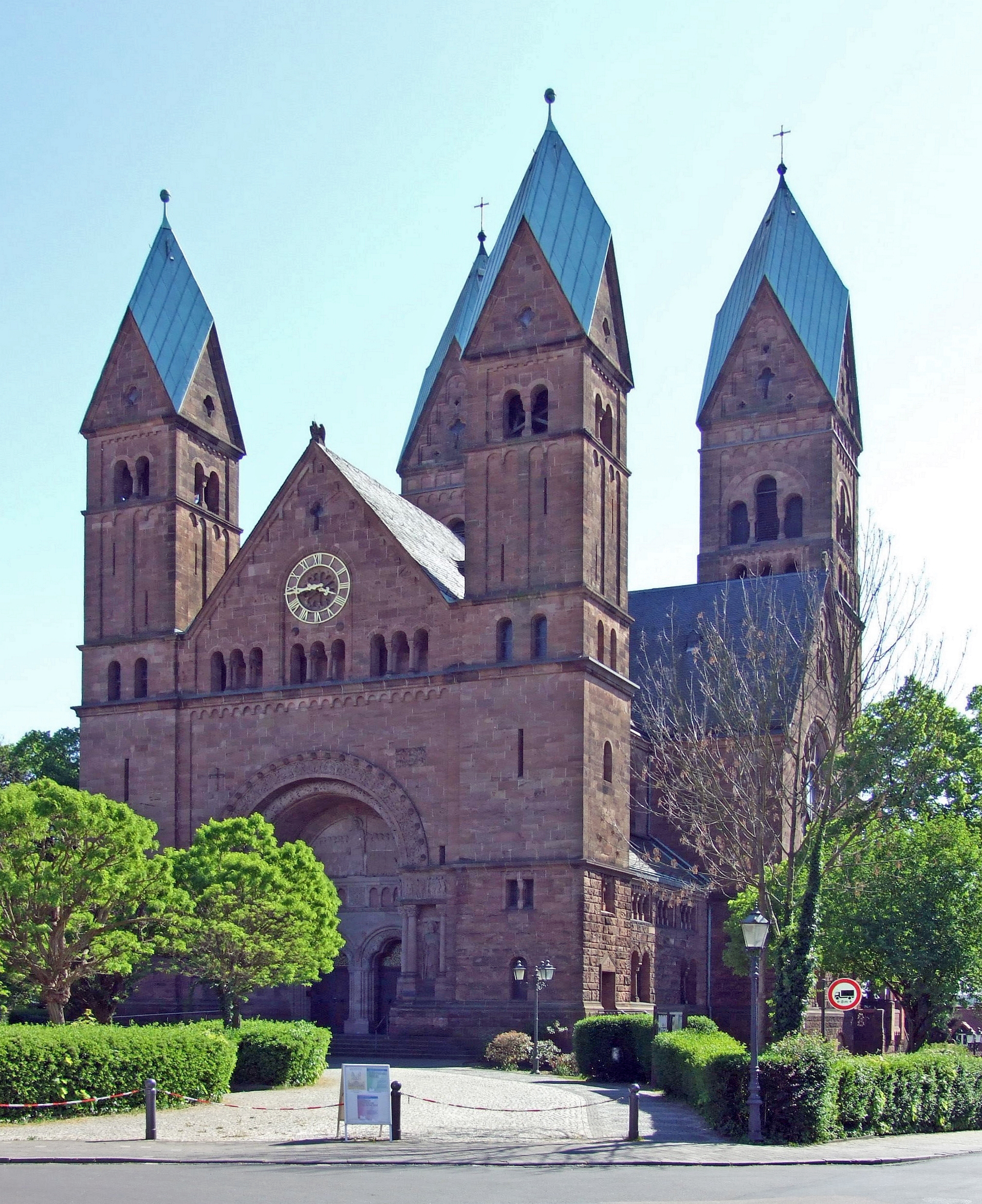 Erloeserkirche in Bad Homburg